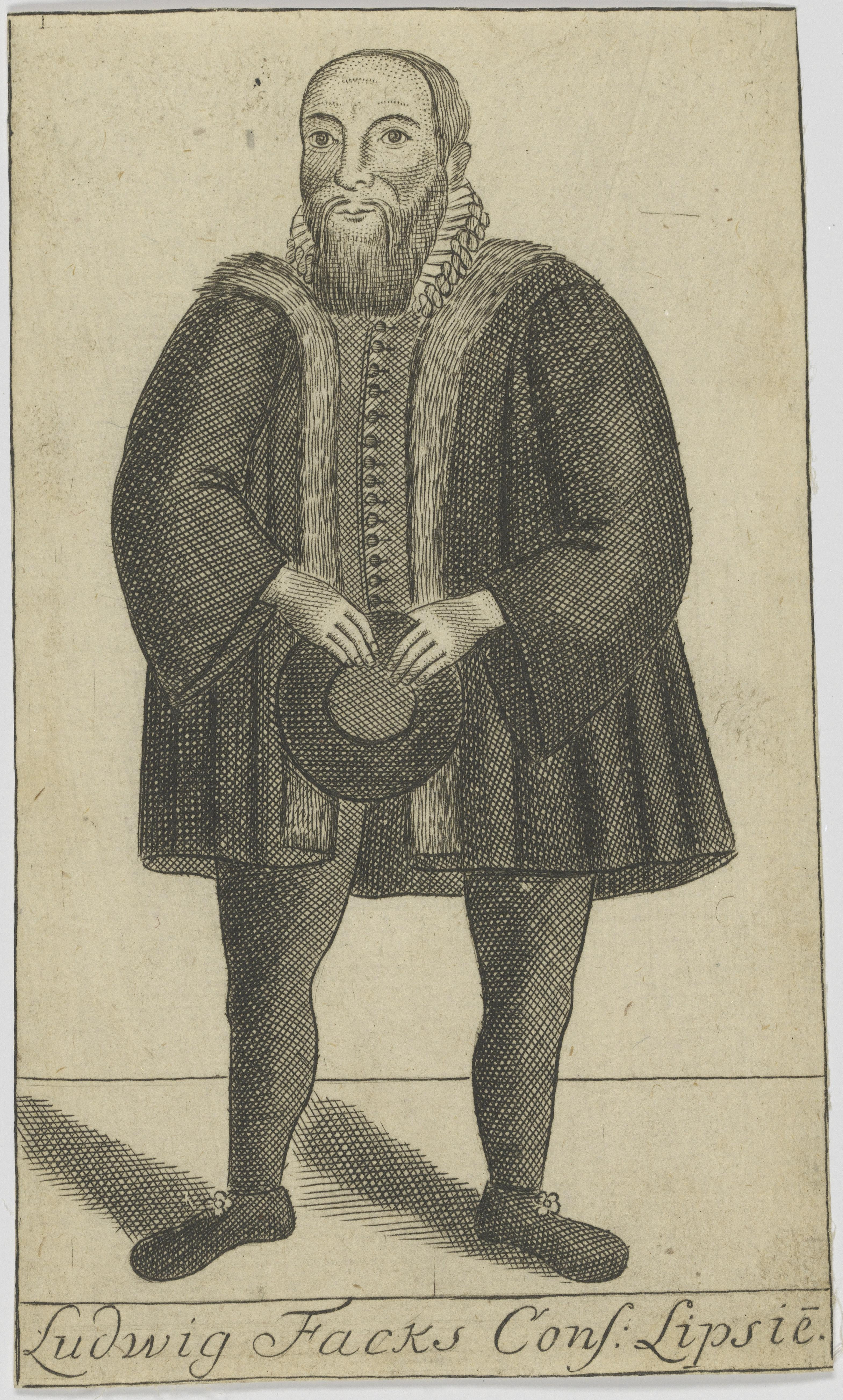 Bildnis des Ludwig Fachs (Facks), Bürgermeister von Leipzig; 14.6 x 8.8 cm